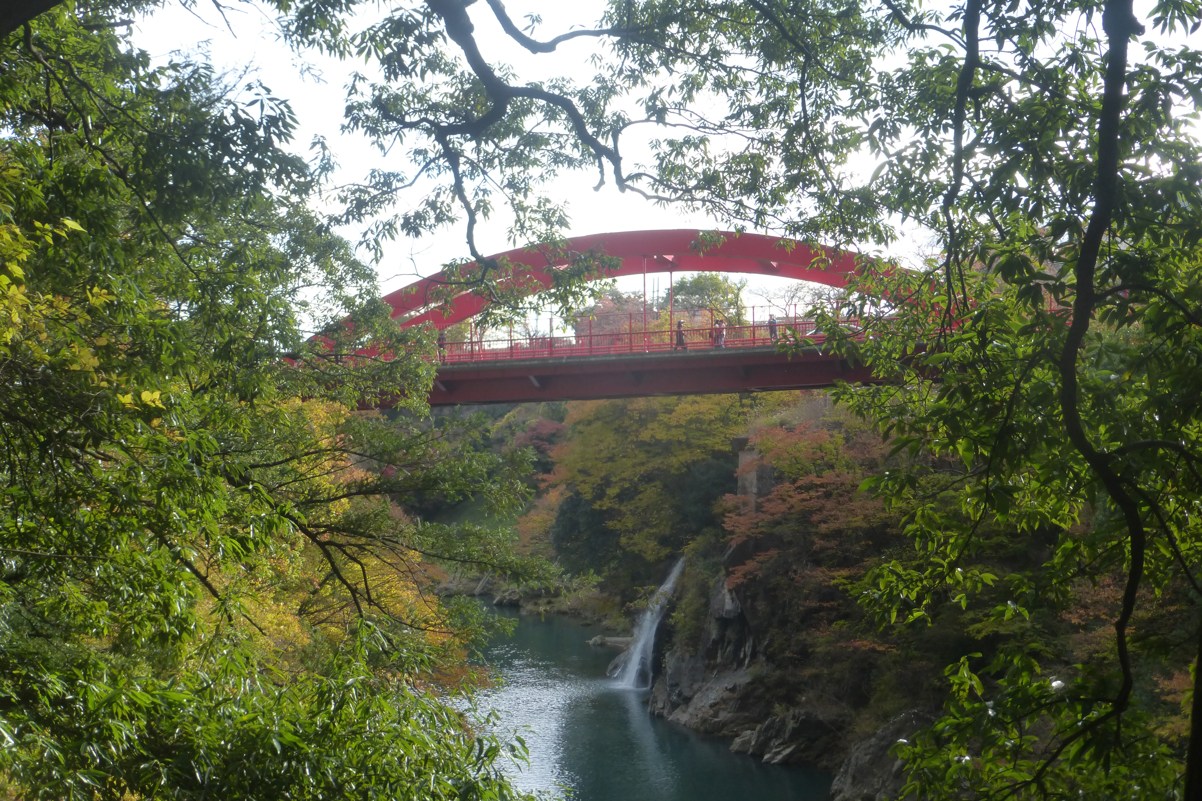 高津戸橋（たかつどばし, Takatsudo bridge）